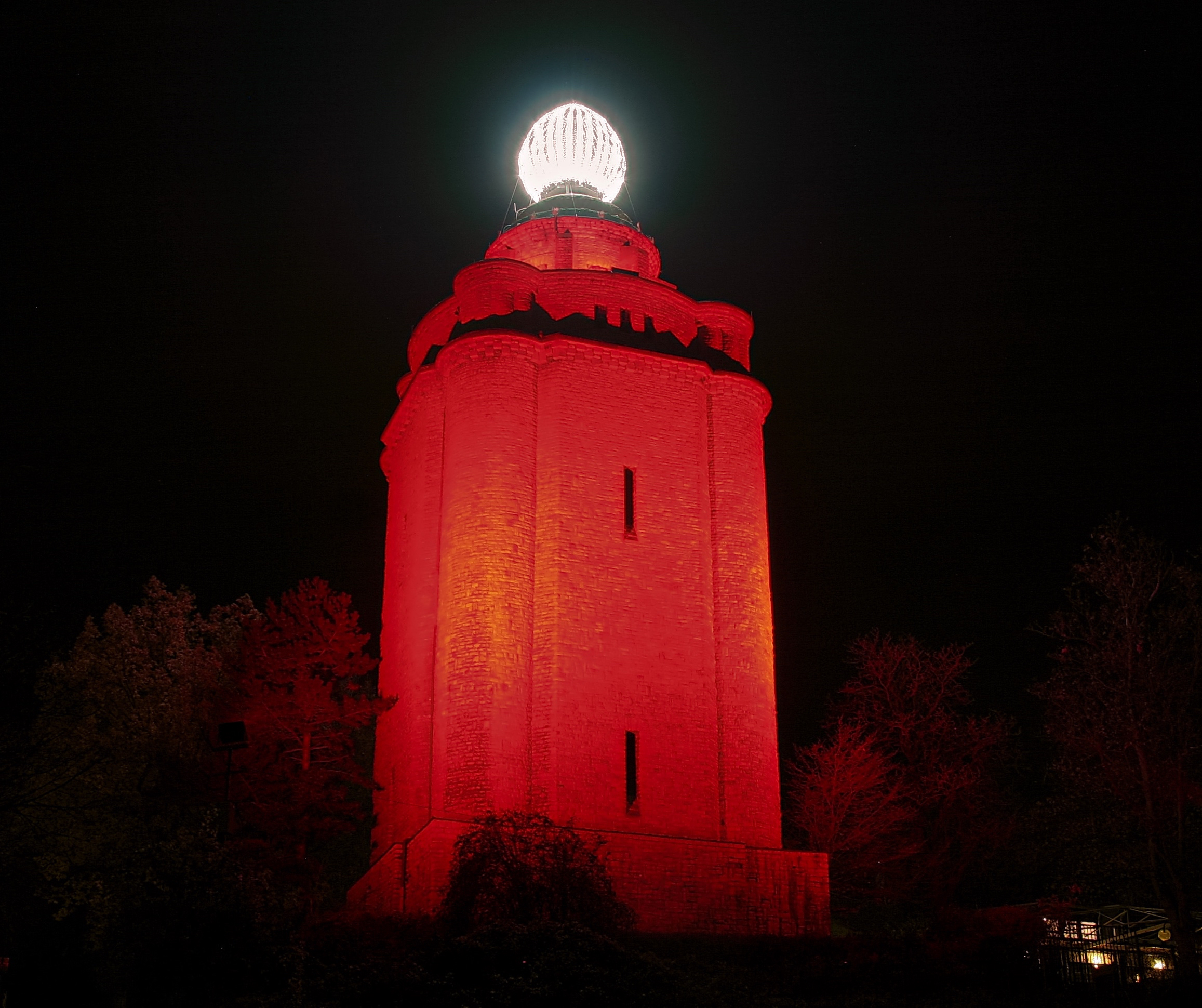 Bismarckturm als Ingelummer Kerz 2018